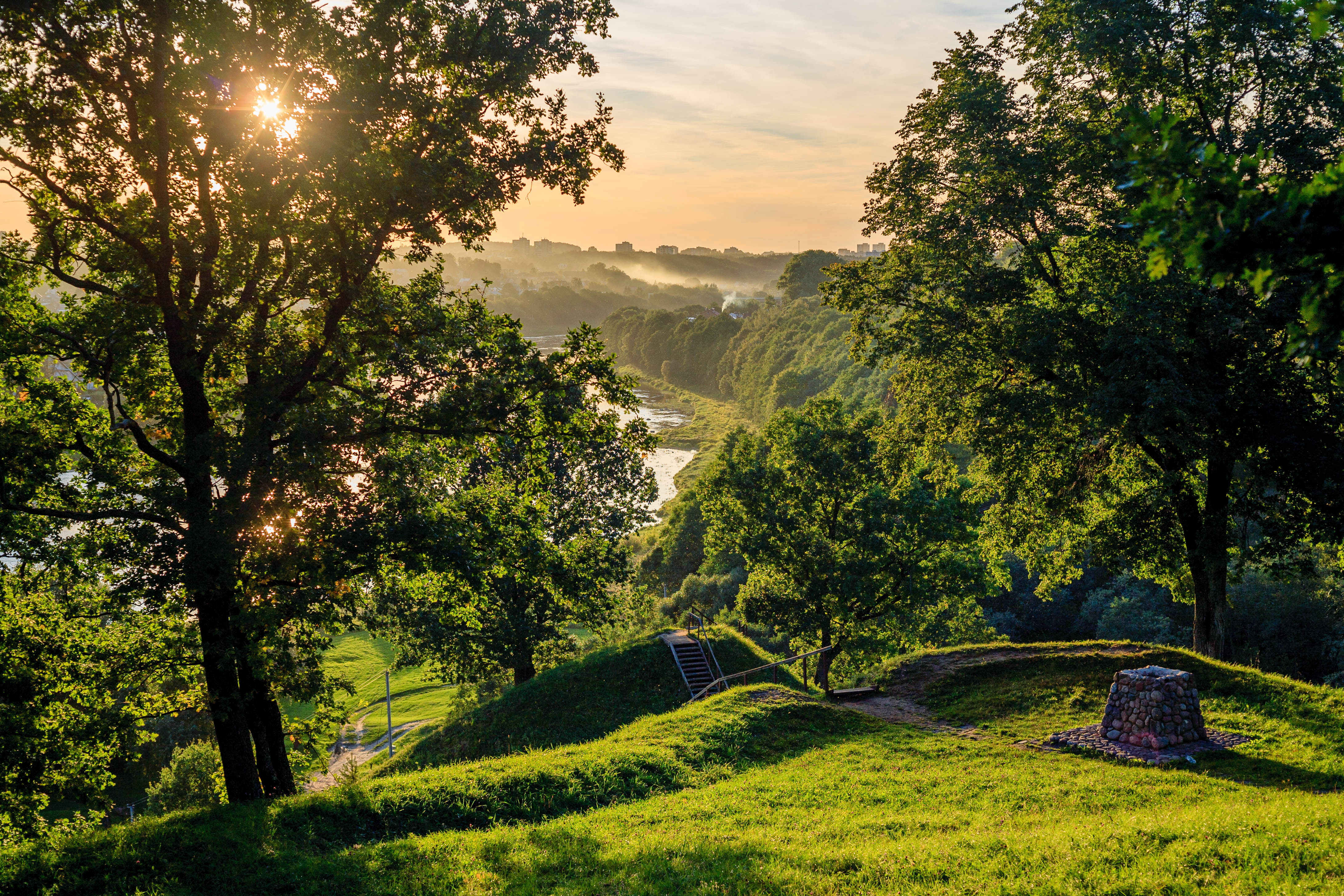 Alytaus piliakalnis rudenį